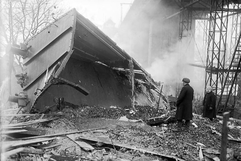 Zu dem großen Eisenbahnunglück auf der Strecke München-Berlin, wo bei Ludwigstadt ein Eilgüterzug mit 20 Wagen den 30 mtr. hohen Viaduckt hinabsauste. Ein vollständig zermalmter Güterwagen.